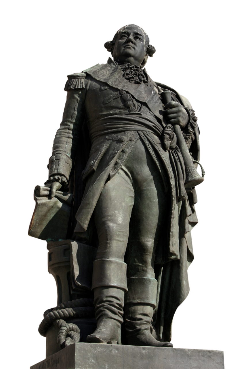 Montagne (sculpteur), Monument au bailli de Suffren, 1866, détail, Saint-Tropez, quai de Suffren.